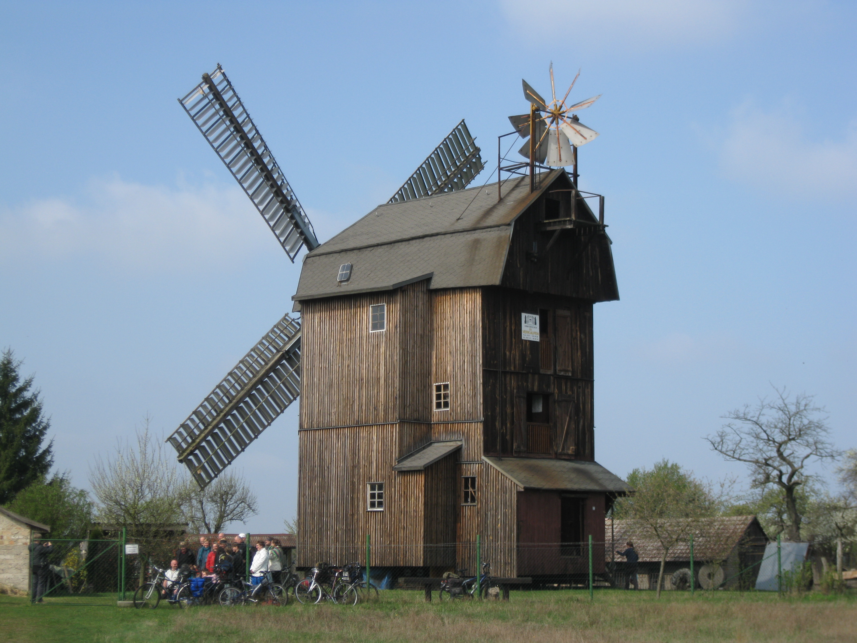 Windmill in Petkus